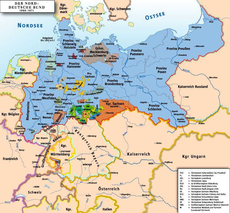 Karte des Norddeutschen Bundes 1866–1871 / Map of North German Confederation 1866–1871